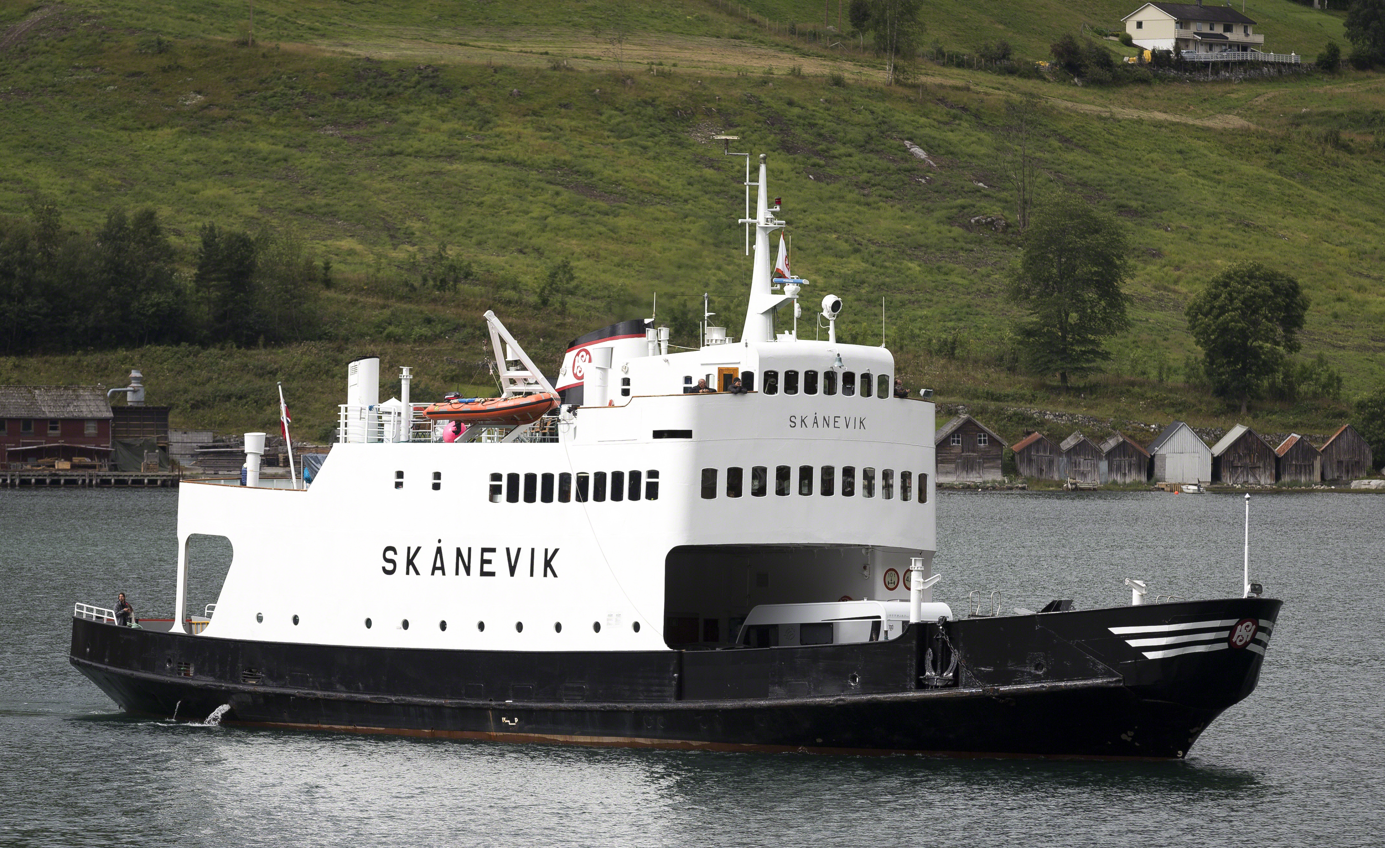 MF Skånevik på vei inn til Kaupanger i rute fra Gudvangen.